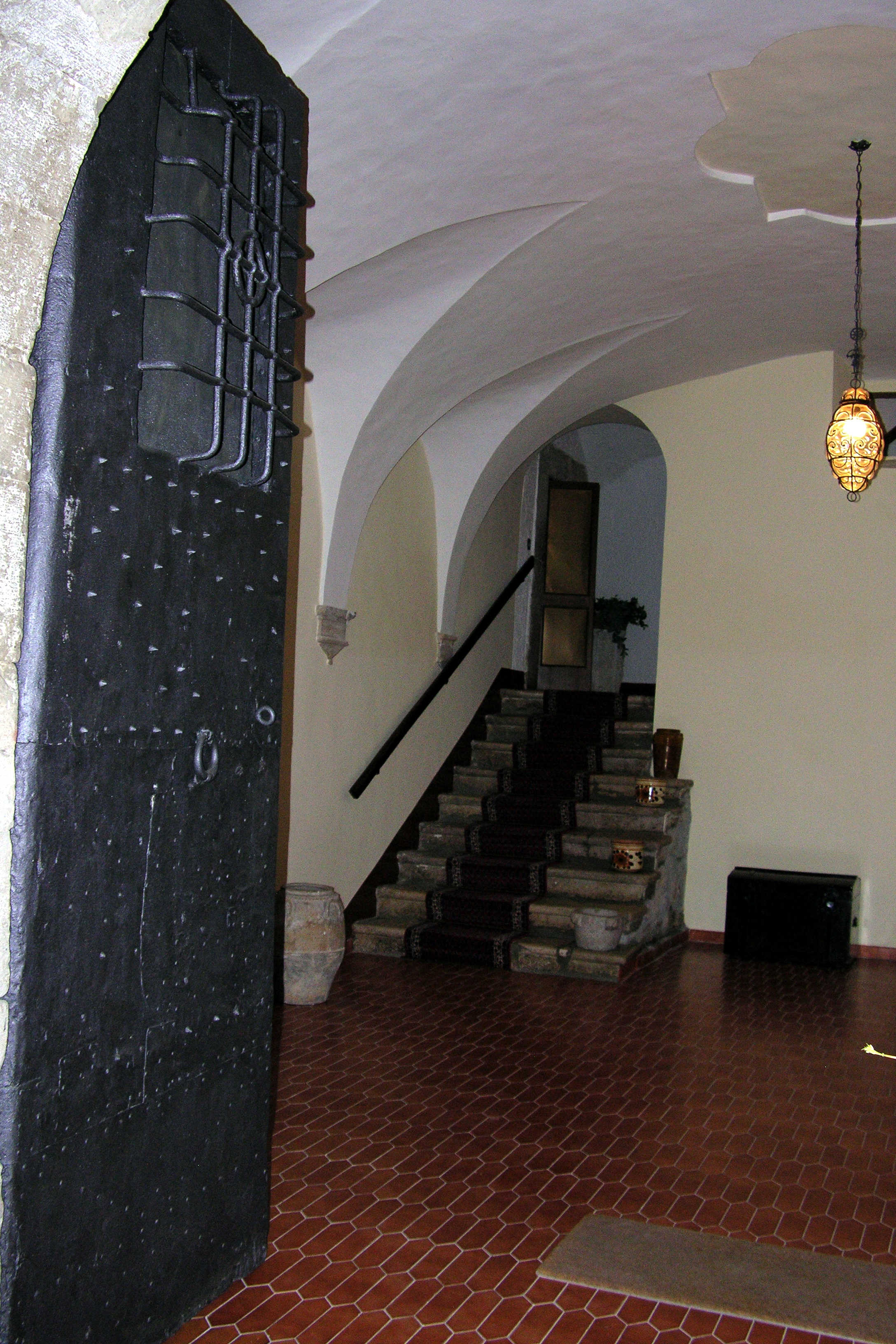 La porta ferrata con l'androne e lo scalone in pietra del palazzo Iambrenghi di Candela